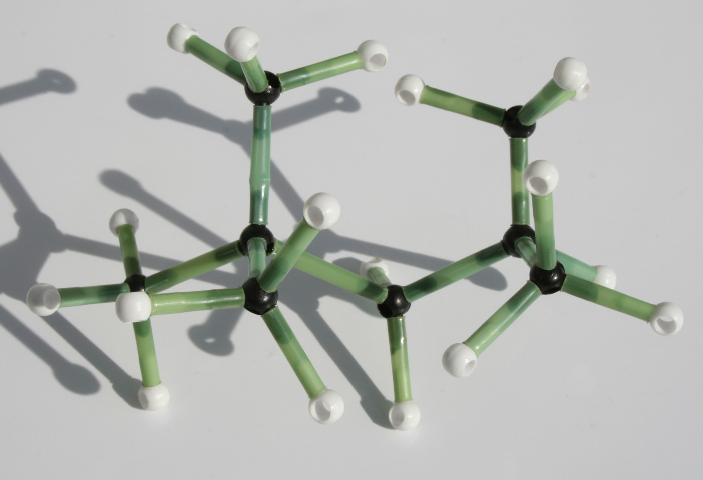 Molekülbaukasten: Molekülmodell von 2,2,4-Trimethylpentan